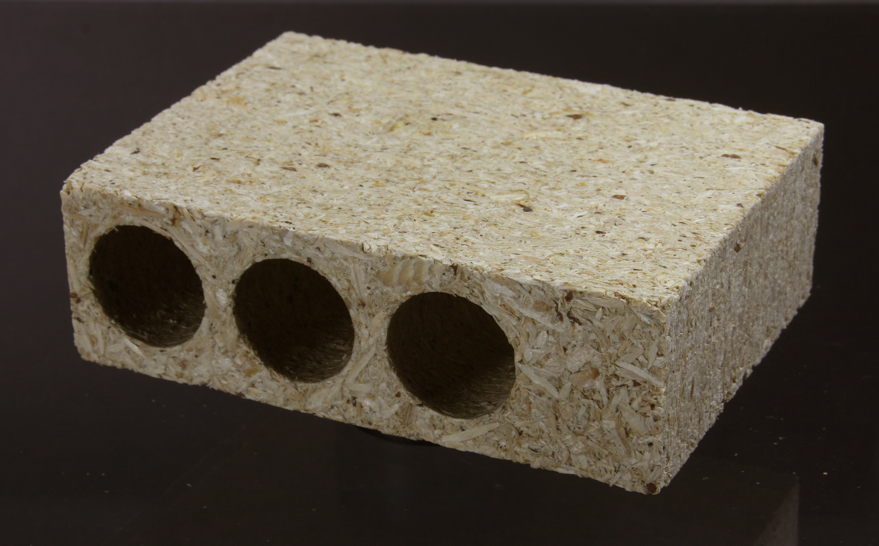 Röhren-Spanplatte